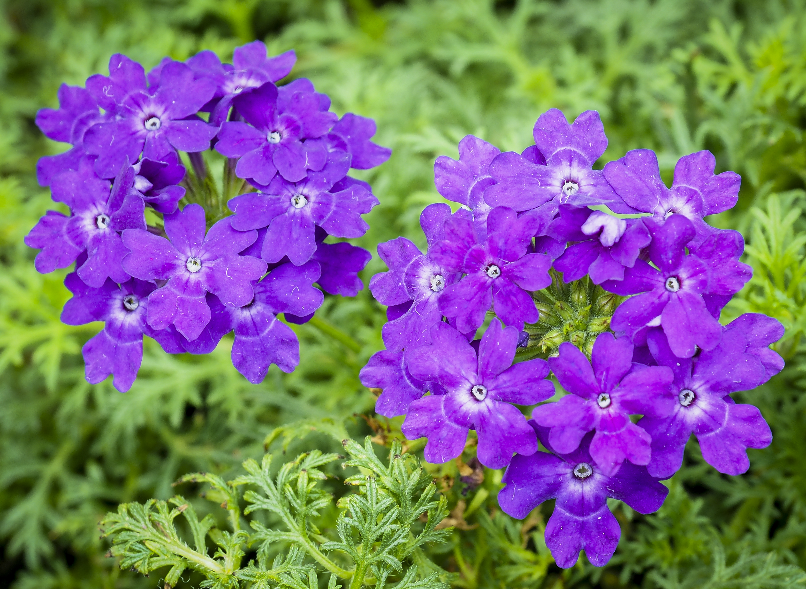 Verbena californica (California vervain)